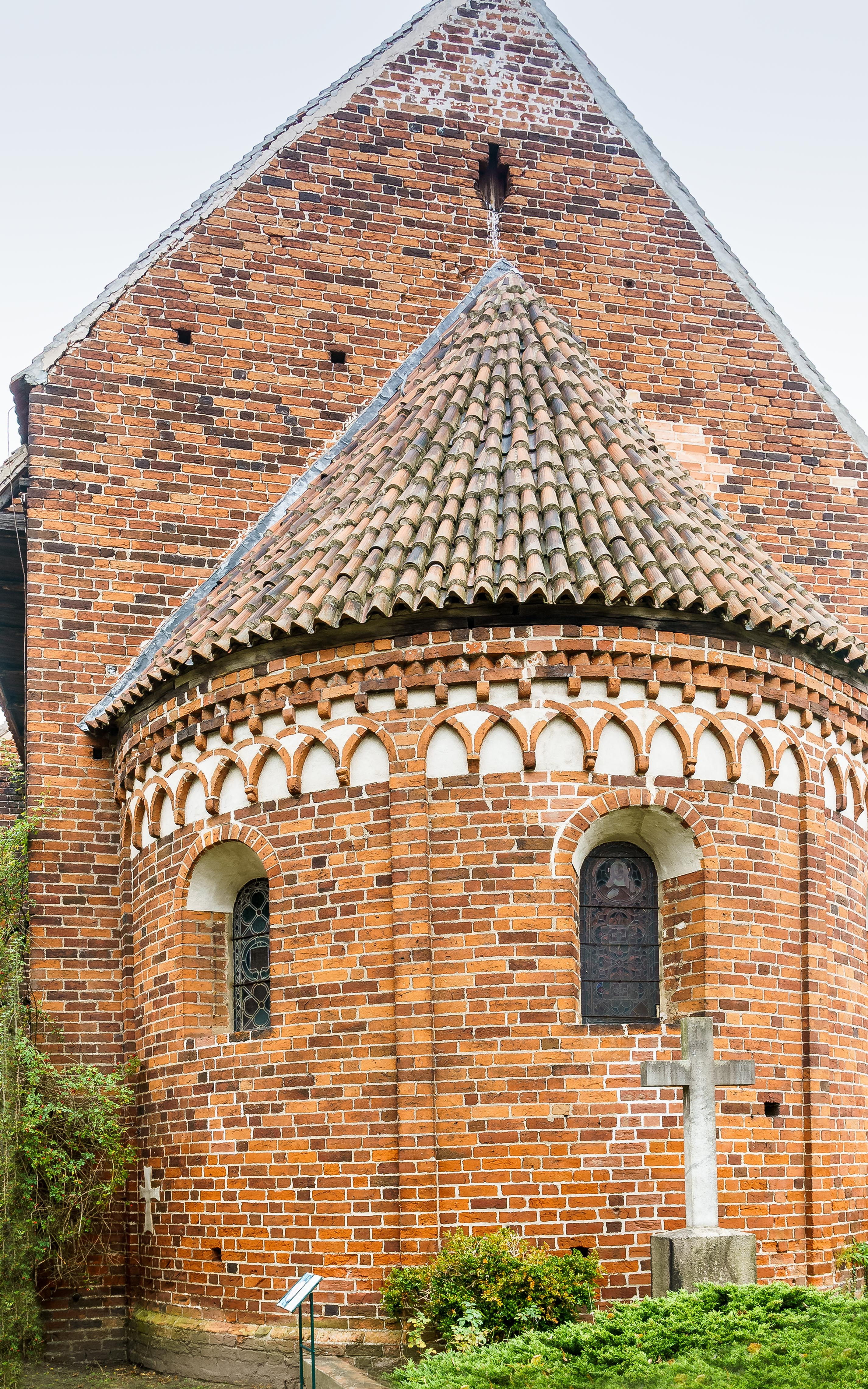 Kreuz an der Südseite des Chores der Kirche in Redekin